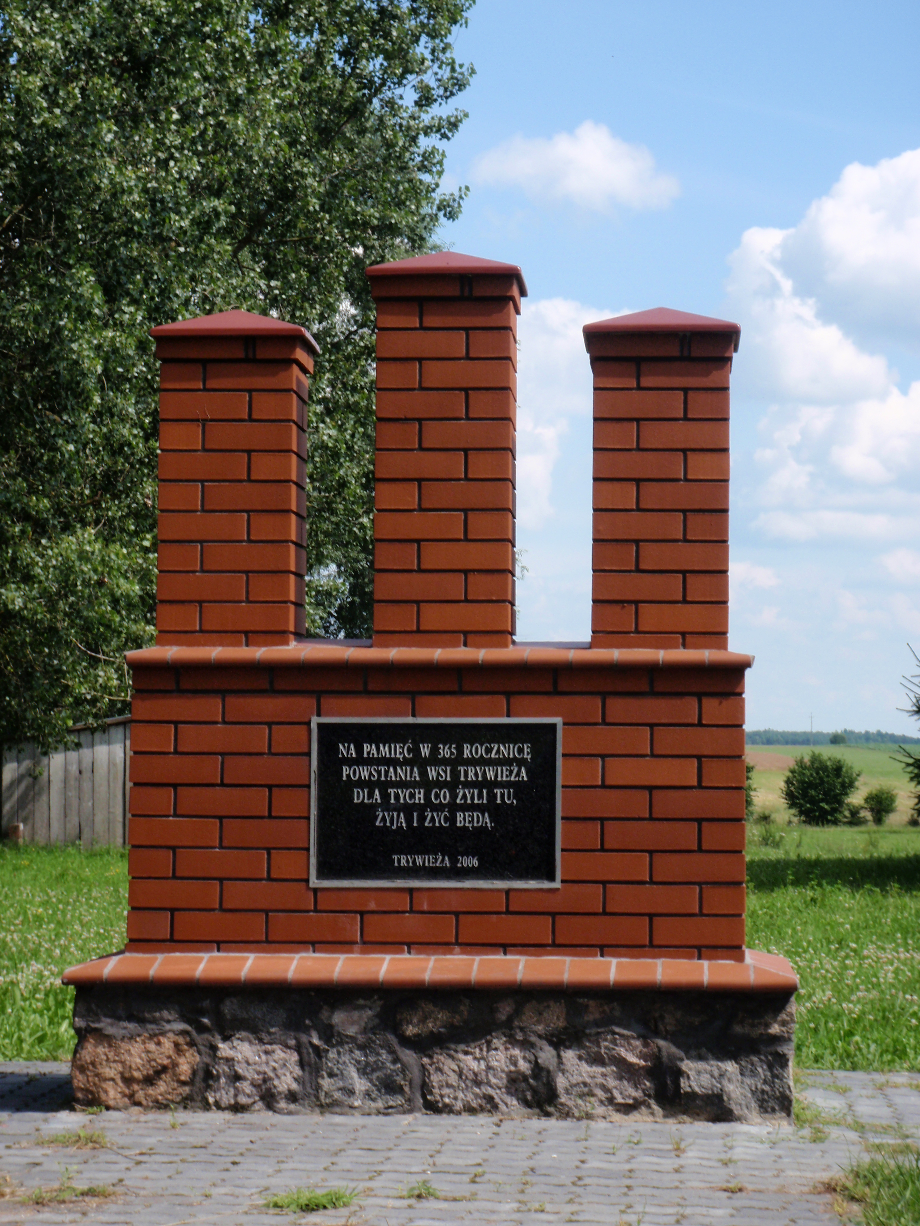 pomnik pamiątkowy we wsi Trywieża